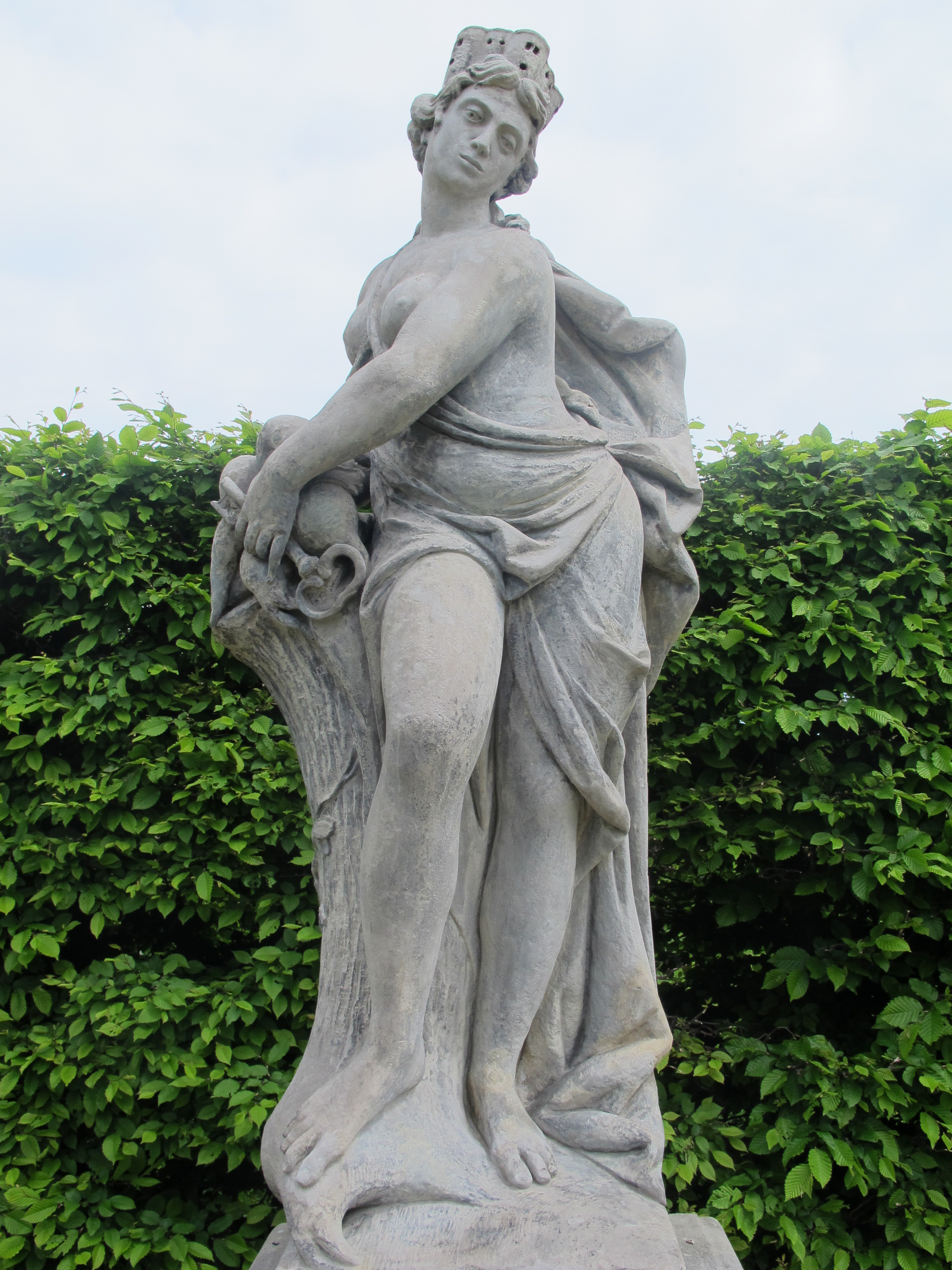 Socha Gaia.Zámek Lysá nad Labem, Zámecká 1/21, Lysá nad Labem